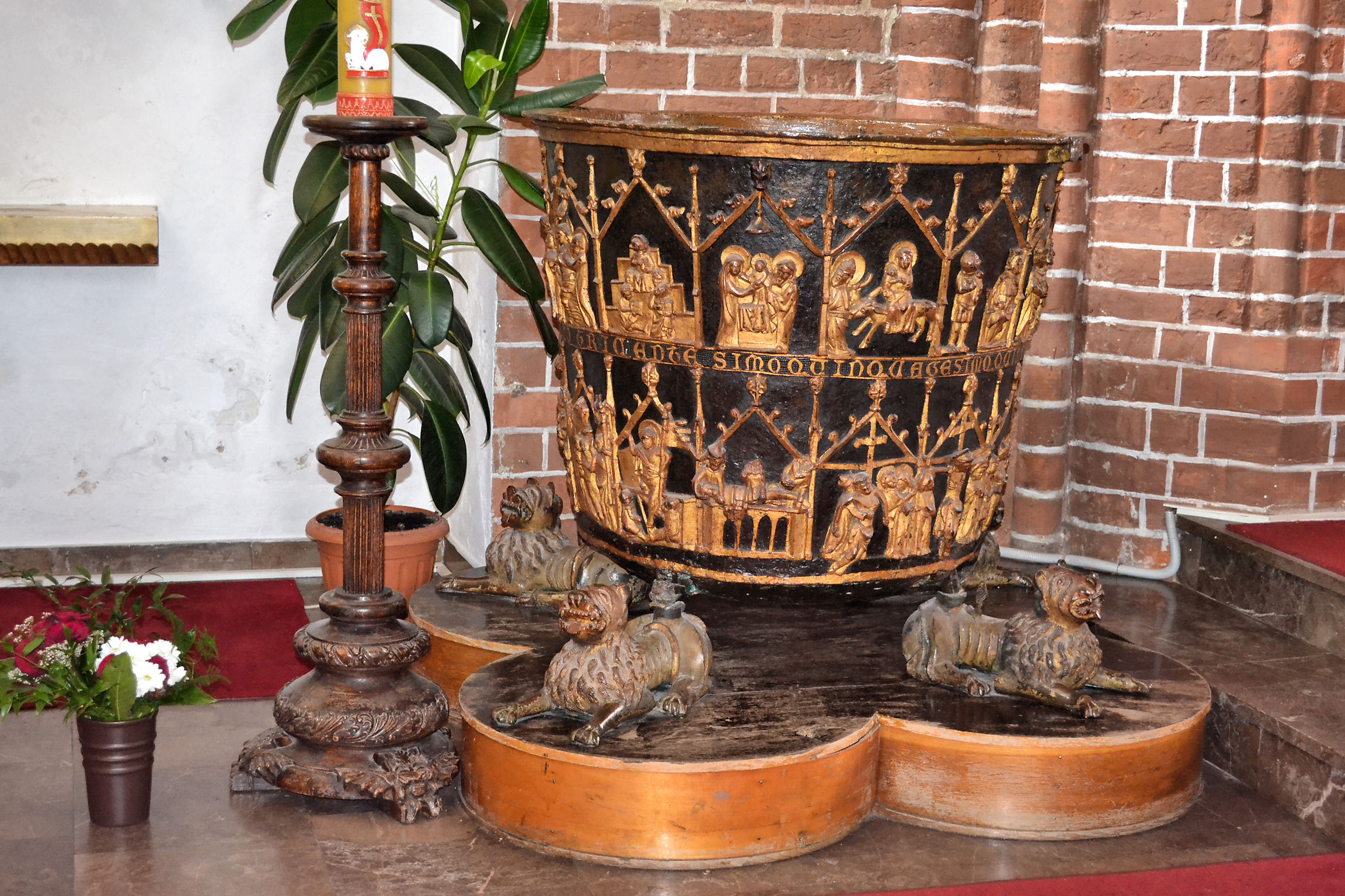 Chrzcielnica z 1355 w katedrze w Kołobrzegu